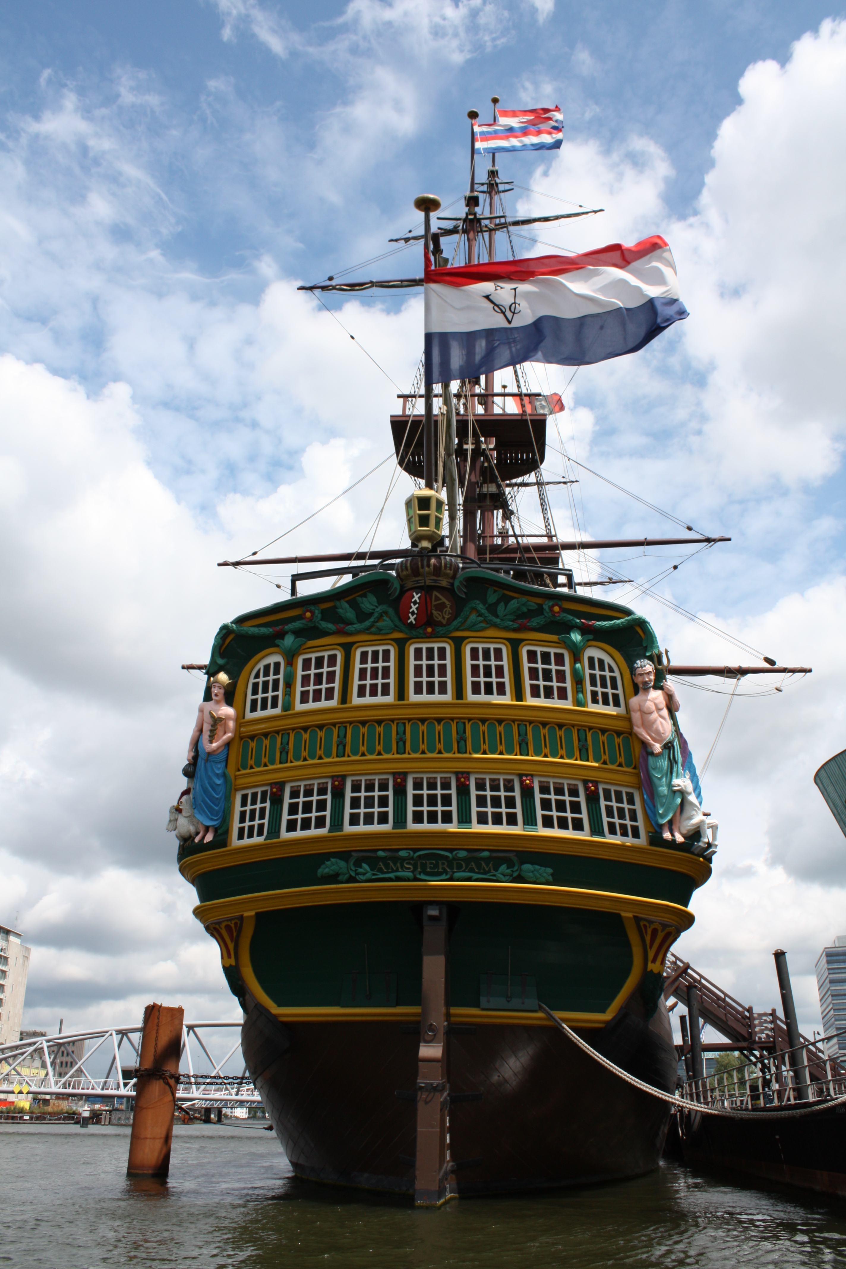 VOC-Schiff Amsterdam (Nachbau) im Amsterdamer Oosterdok - Heckansicht